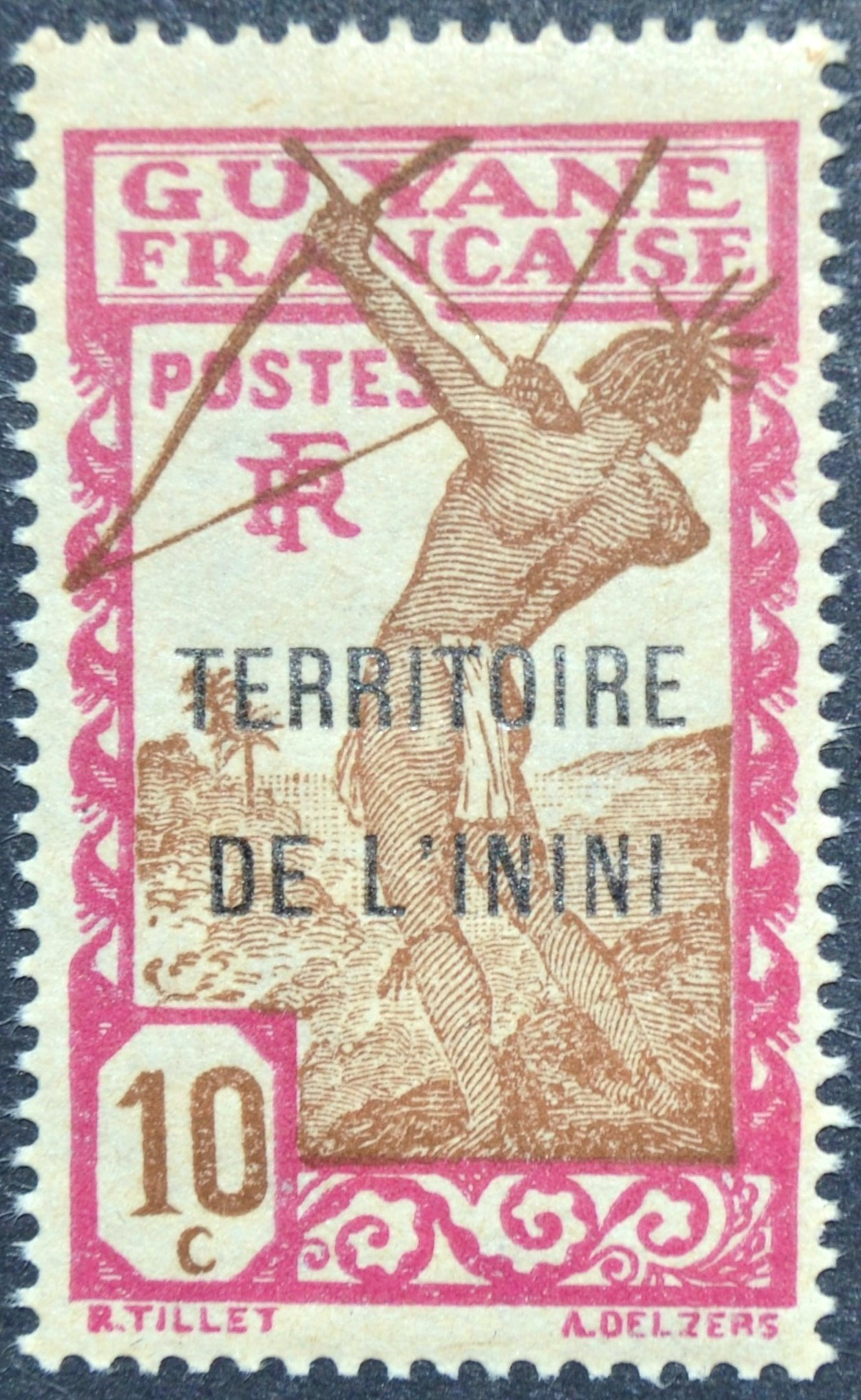 Selo de 10c usado no Território do Inini, na Guiana Francesa, a partir de 1932.